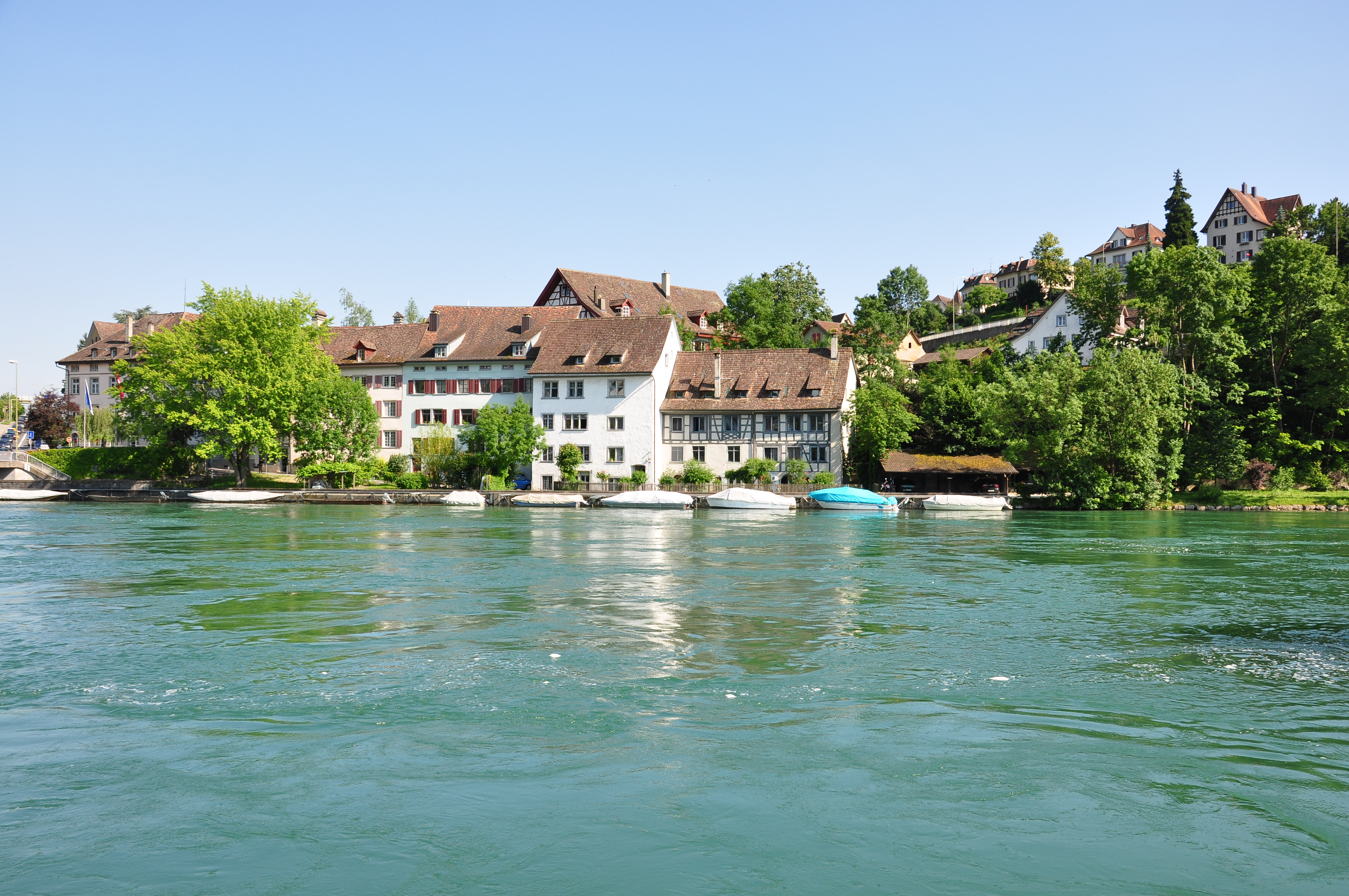 Feuerthalen (Switzerland) as seen from Schaffhausen